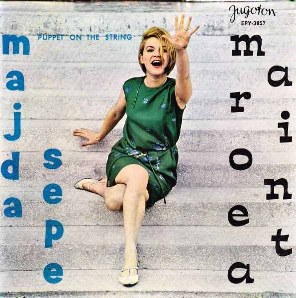 Album Marioneta pevke Majde Sepe.